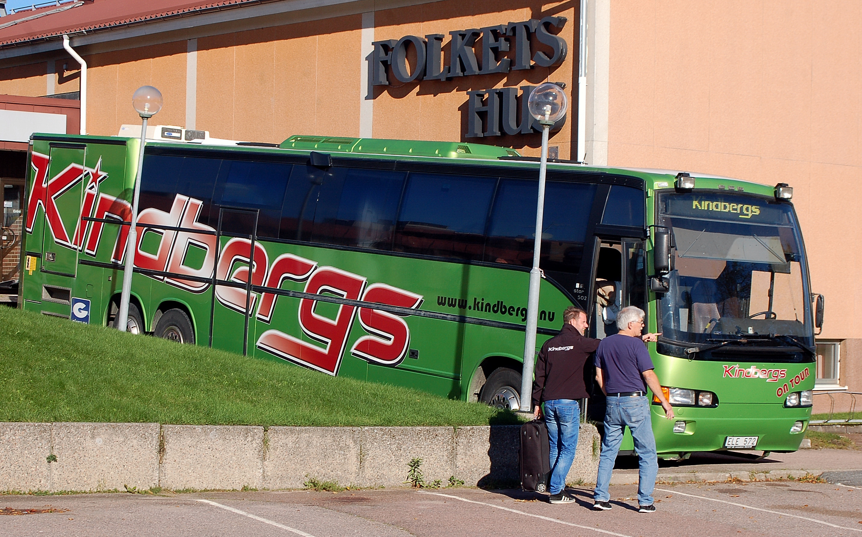 Registreringsnummer: ELE572 Fabrikat: VOLVO CARRUS B10M Fordonsår: 1999 Identifieringsnummer: 1MA712XA050904 I trafik första gången i Sverige: 1999-06-11 Växellåda: AUTOMAT Antal passagerare, max: 8 Tjänstevikt (faktisk vikt), kg: 16595 Totalvikt, kg: 23500 Tillåten lastvikt, kg: 6905 Lastutrymmets längd, mm: 2000 Antal hjul: 8 Antal axlar: 3 Längd, mm: 14800 Bredd, mm: 2550 Höjd, mm: 3660 Drivmedel 1: DIESEL Tankvolym, liter: 450 Motoreffekt, kW: 265,0.